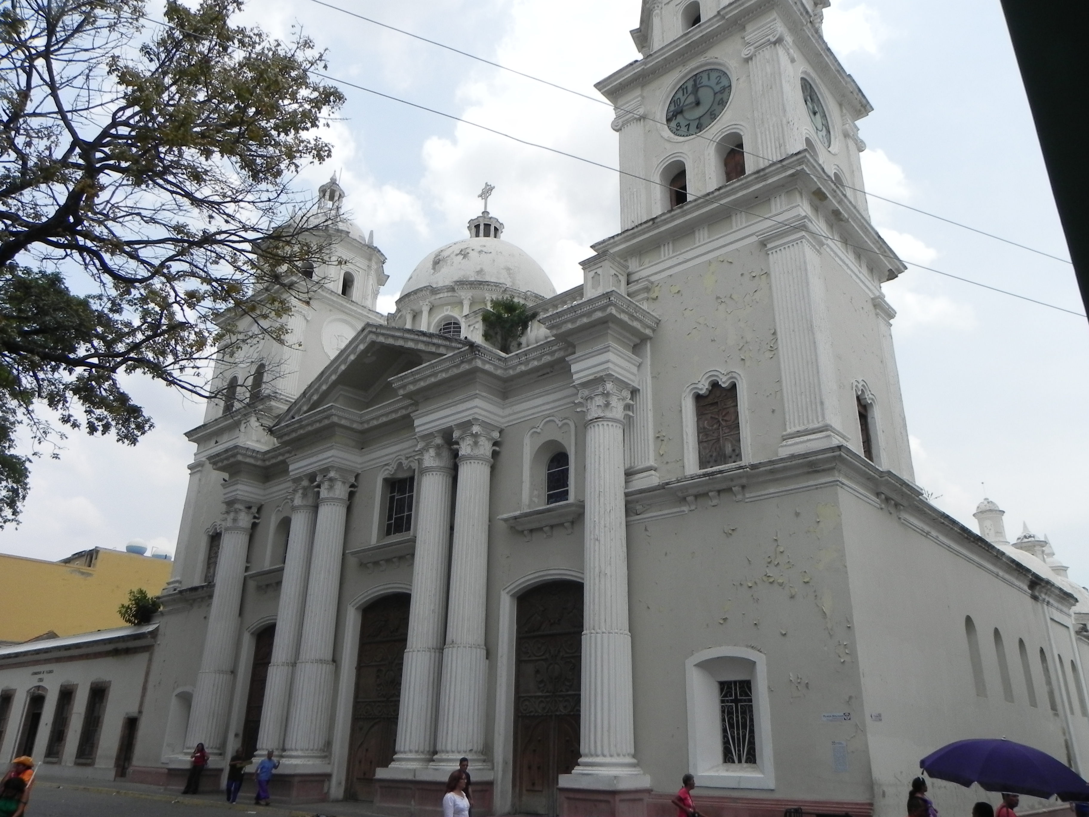 Catedral de Valencia, Estado Carabobo, Venezuela